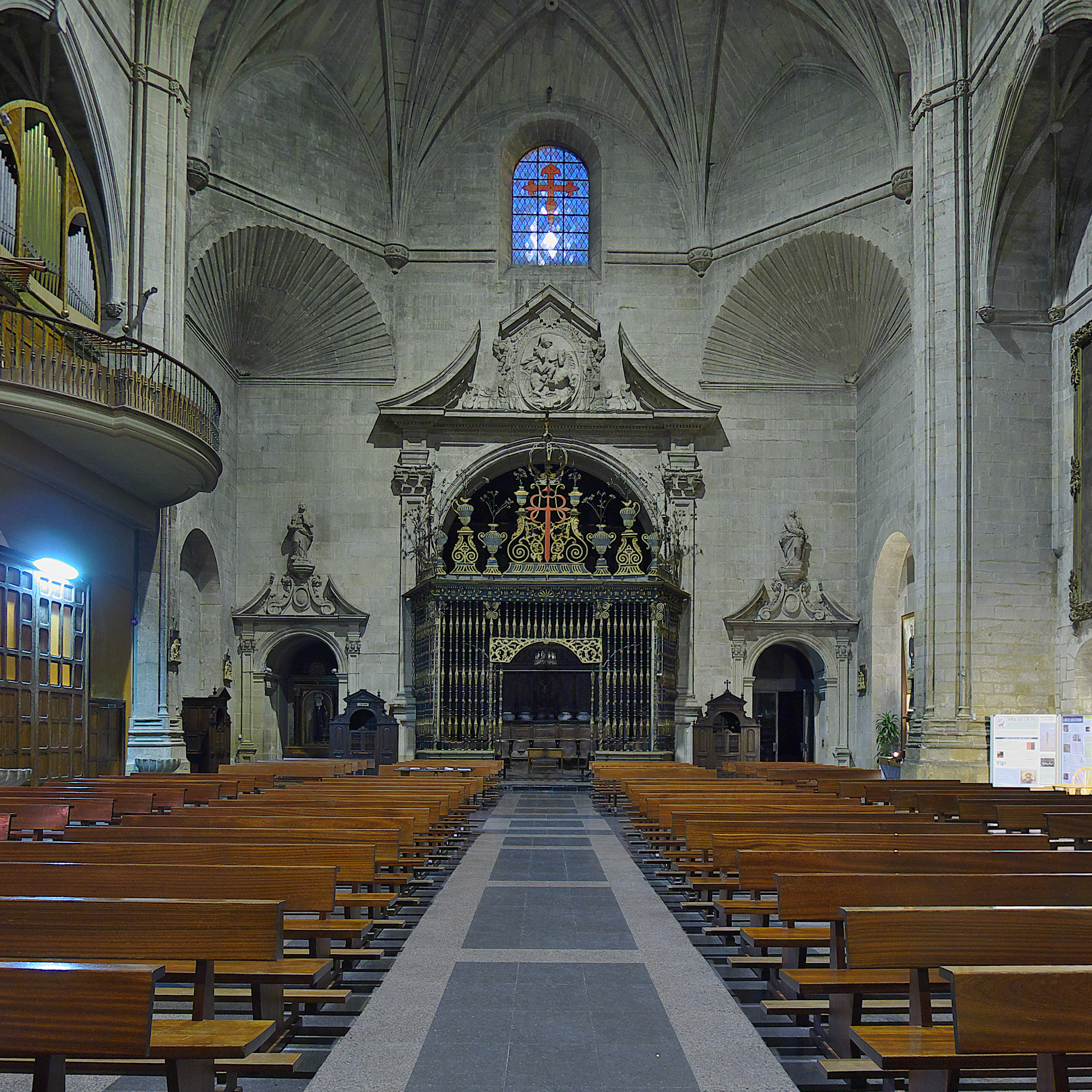 Coro de la iglesia. La reja es obra de Sebastián de Medina (1676).